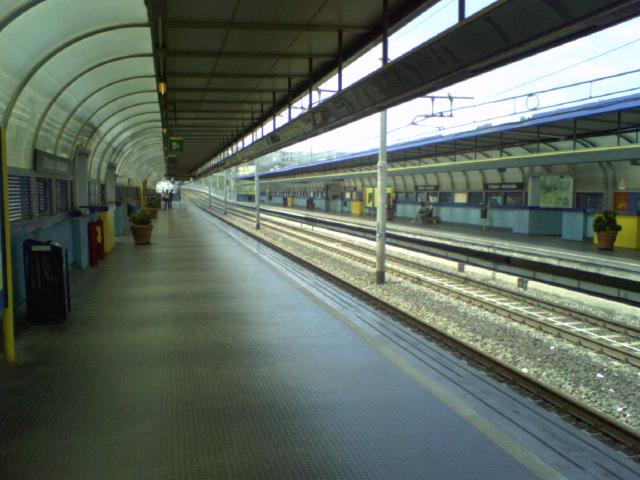 Stazione di Chiaiano della metropolitana di Napoli